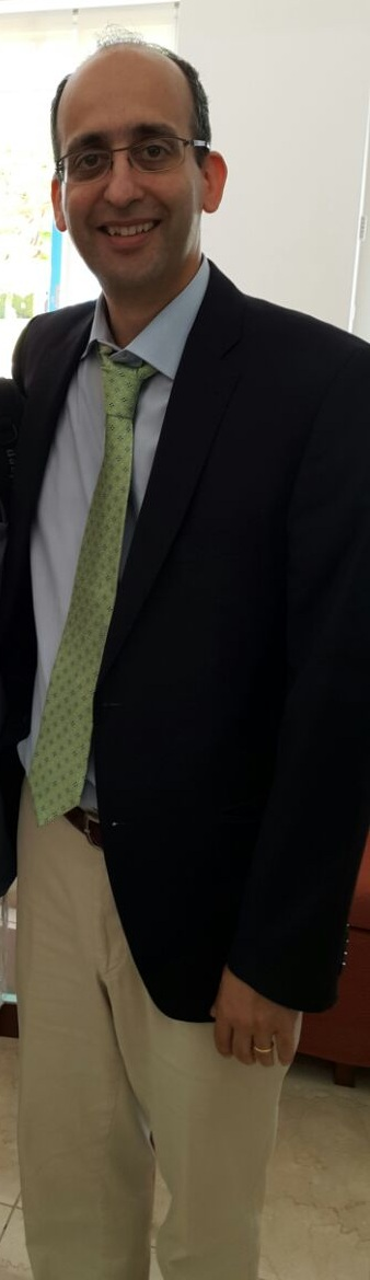 שרווין יוסף סתארה, המזכ"ל של העדה הבהאית